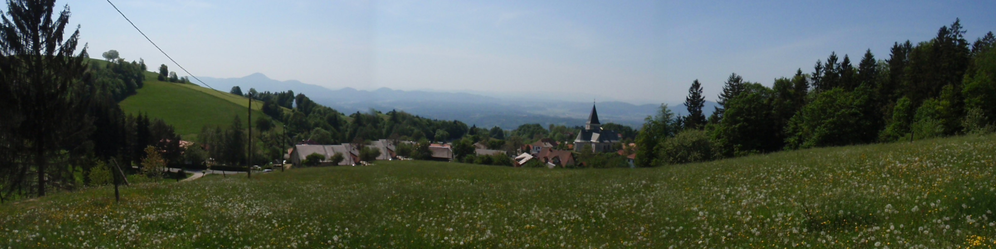 Tinje